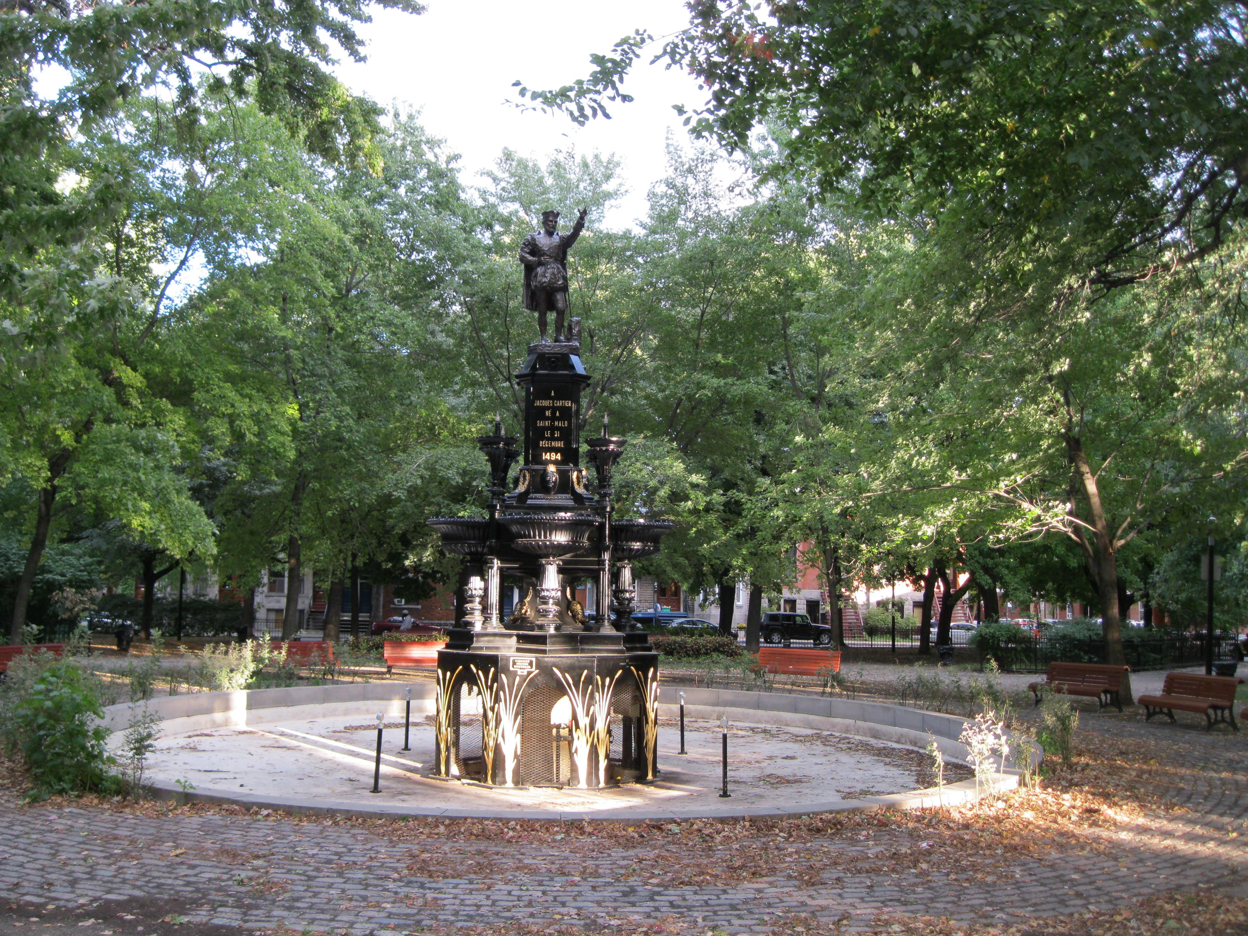 Le parc Saint-Henri est un parc de Montréal situé dans le quartier Saint-Henri. Au centre du parc, il y a une fontaine où s'élève un monument à Jacques Cartier. Grand répertoire du patrimoine bâti de Montréal